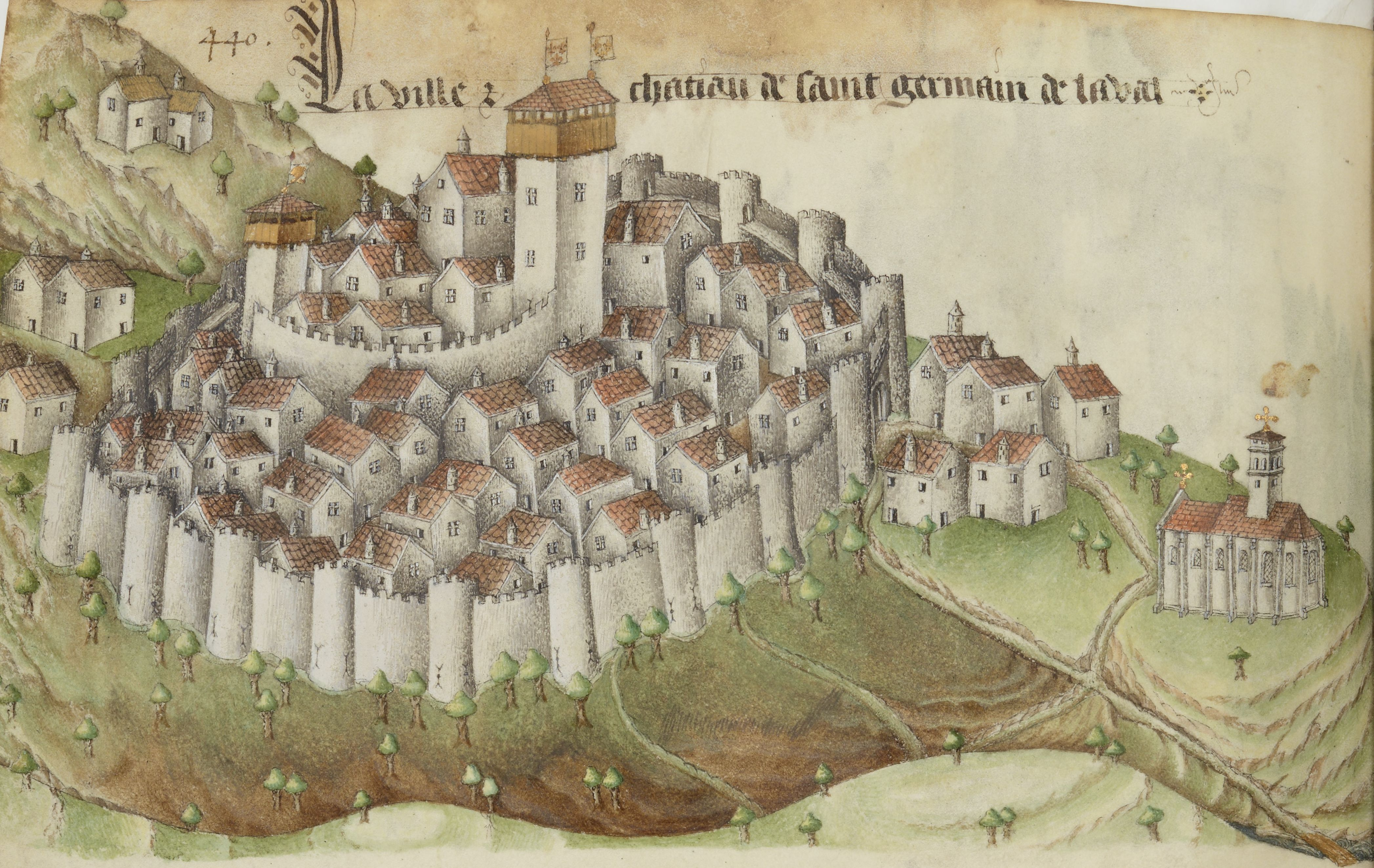 in armorial d'Auvergne description de villes chateaux et blasons.